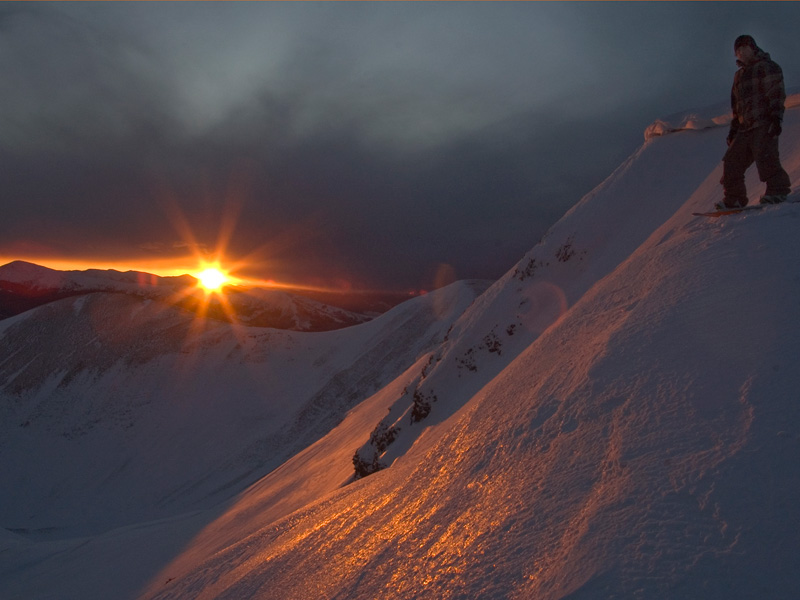 Драгобрат